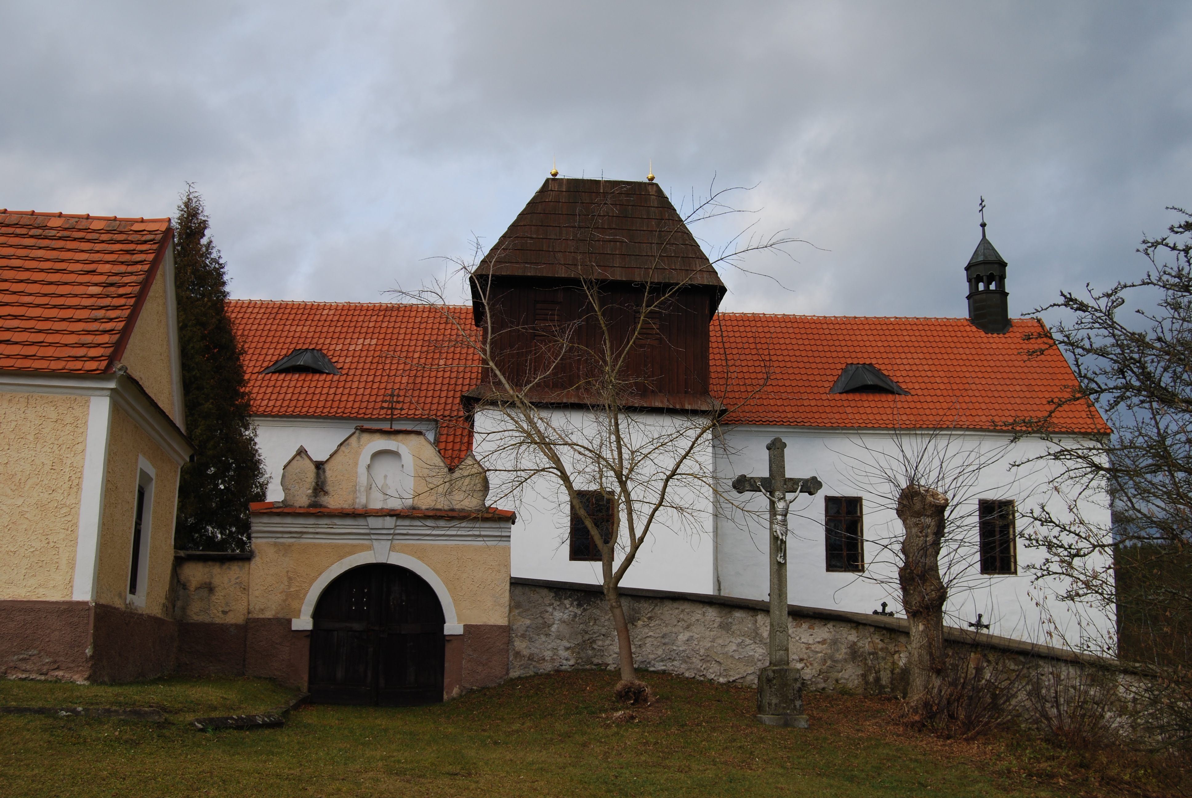 Chřešťovice. Kostel sv. Jana Křtitele z 13 století. Chřešťovice je vesnice, část obce Albrechtice nad Vltavou v okrese Písek. Česká republika.